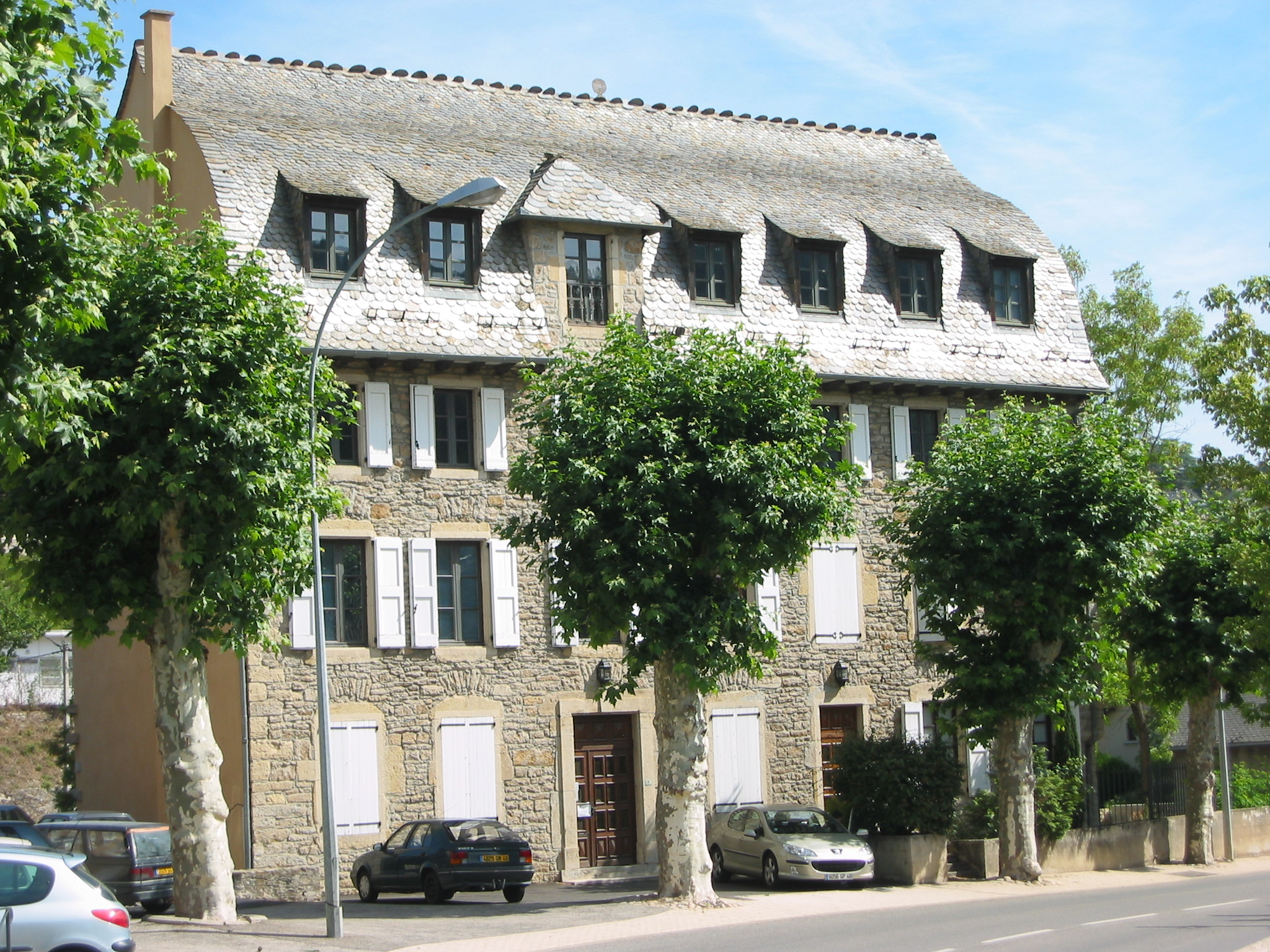 Mende, Lozère, France. Une maison typique avec son toit en carène.